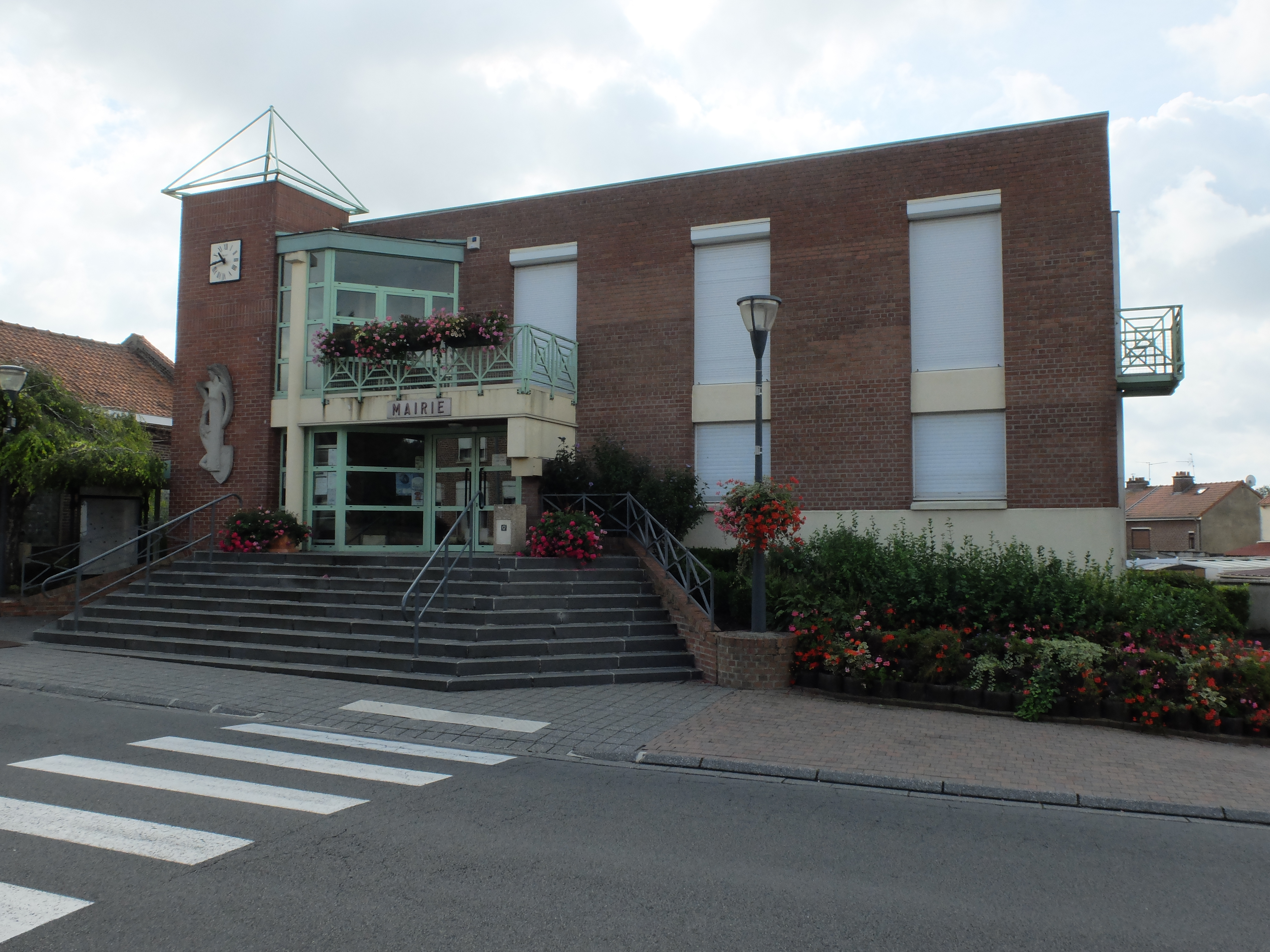 Vue de la mairie de Lieu-Saint-Amand.